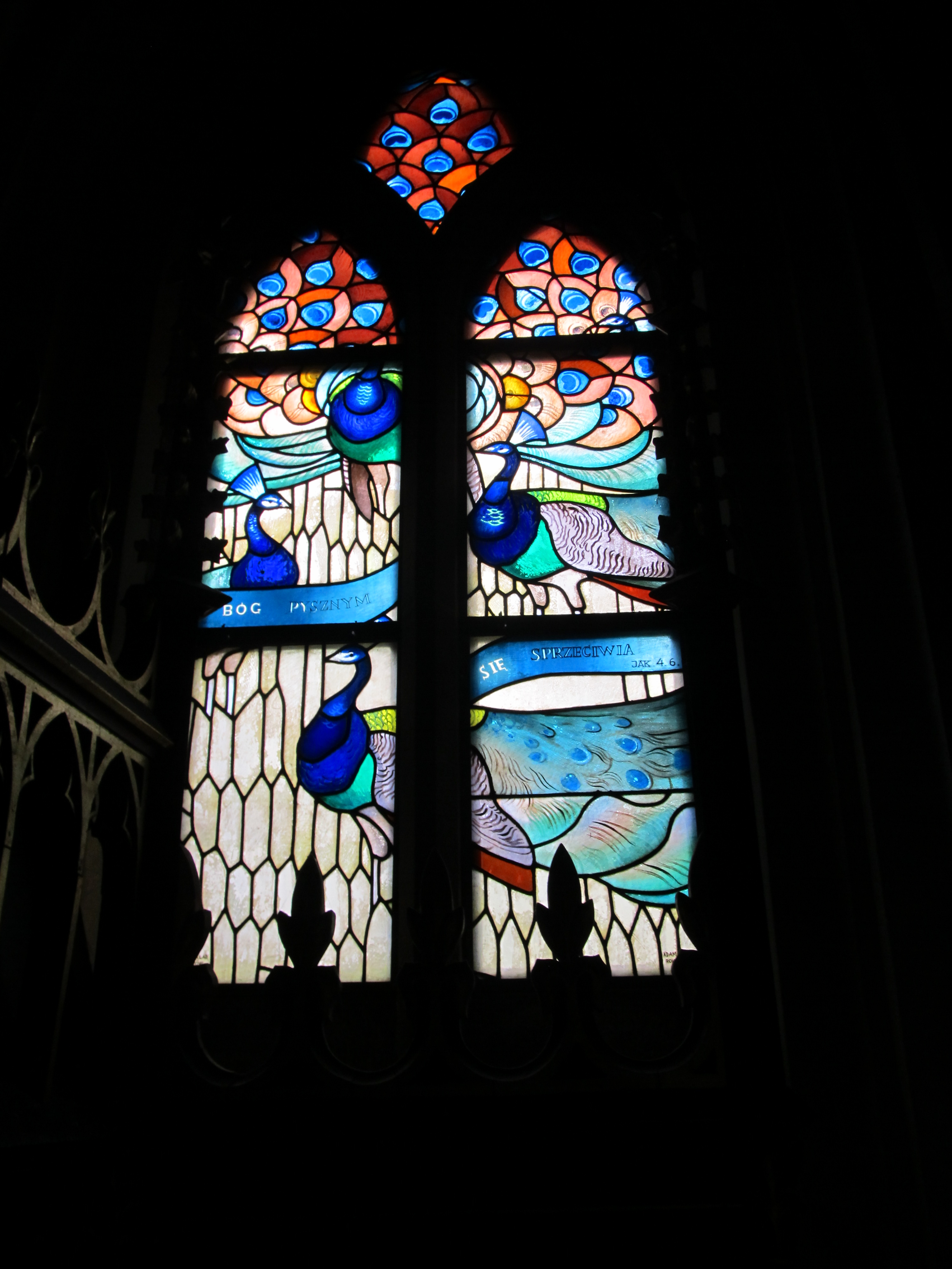 Kościół Mariacki w Katowicach, Polska